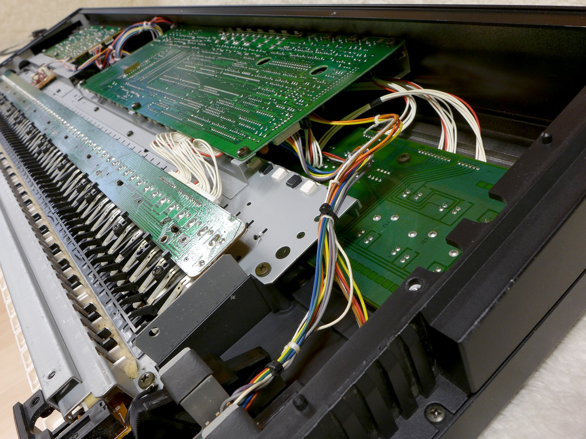 Open DX7II-D